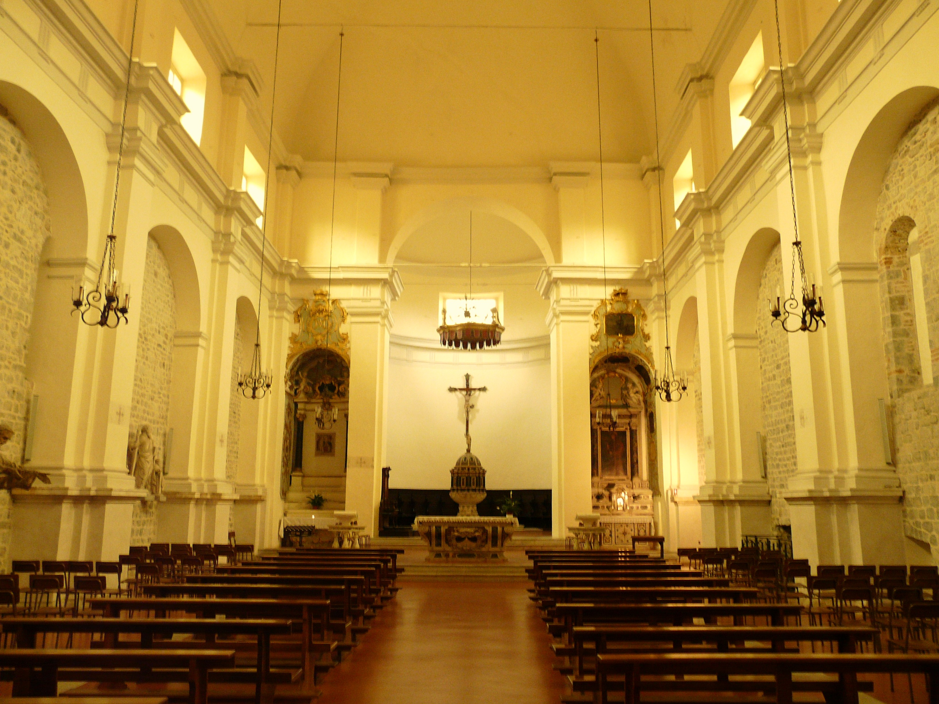 Pieve di Sant'Andrea, Sarzana, Liguria, Italia